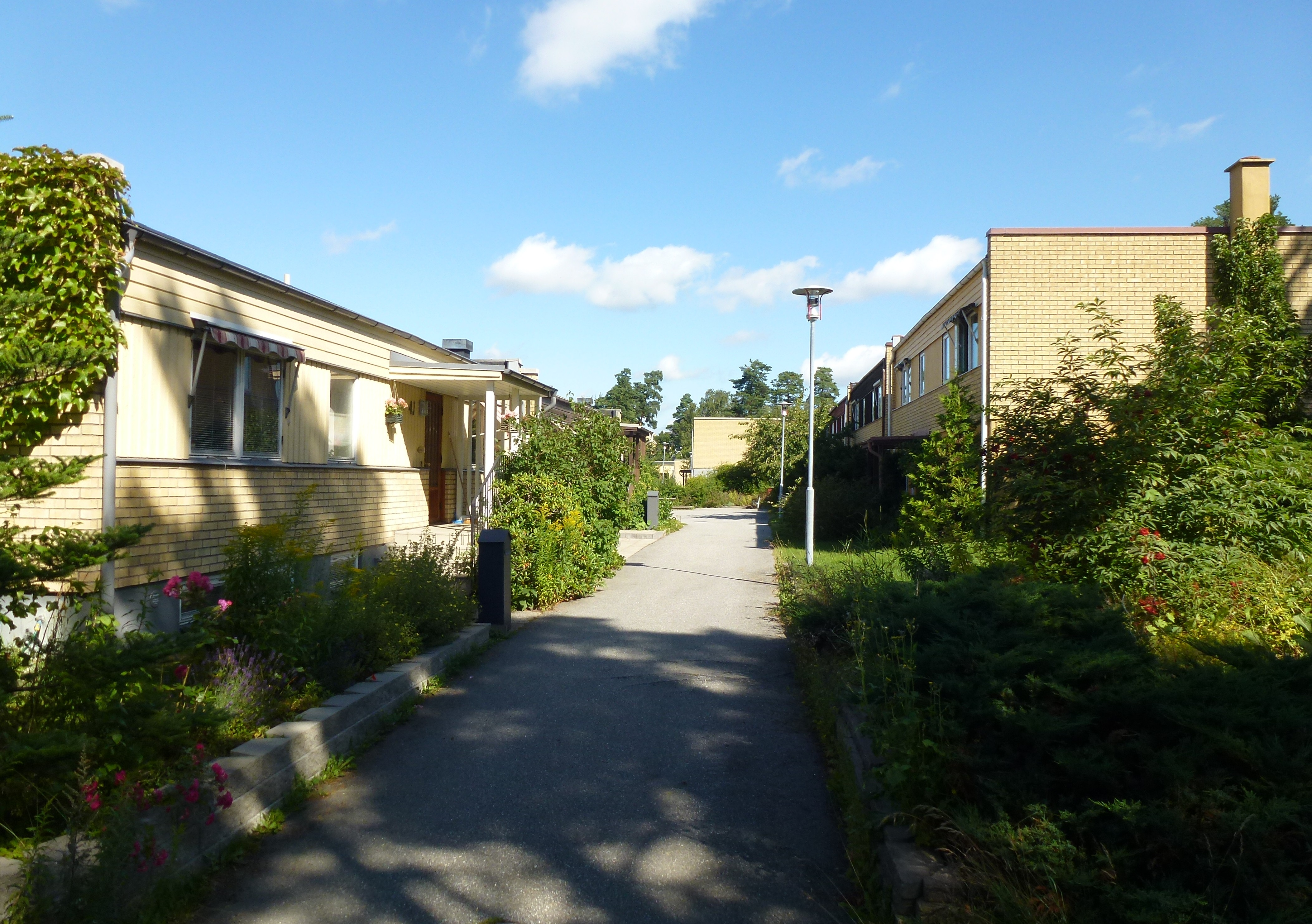 Småhusbebyggelse i Kälvesta Björnidevägen